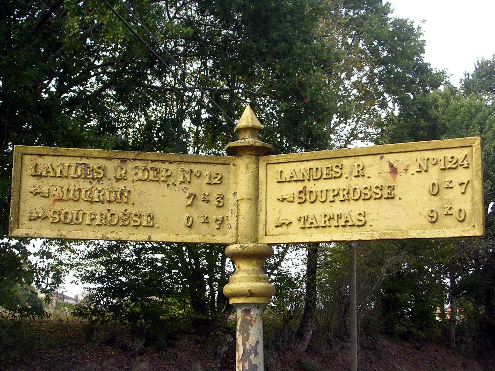 Anciens panneaux de signalisation à Souprosse, dans le département français des Landes